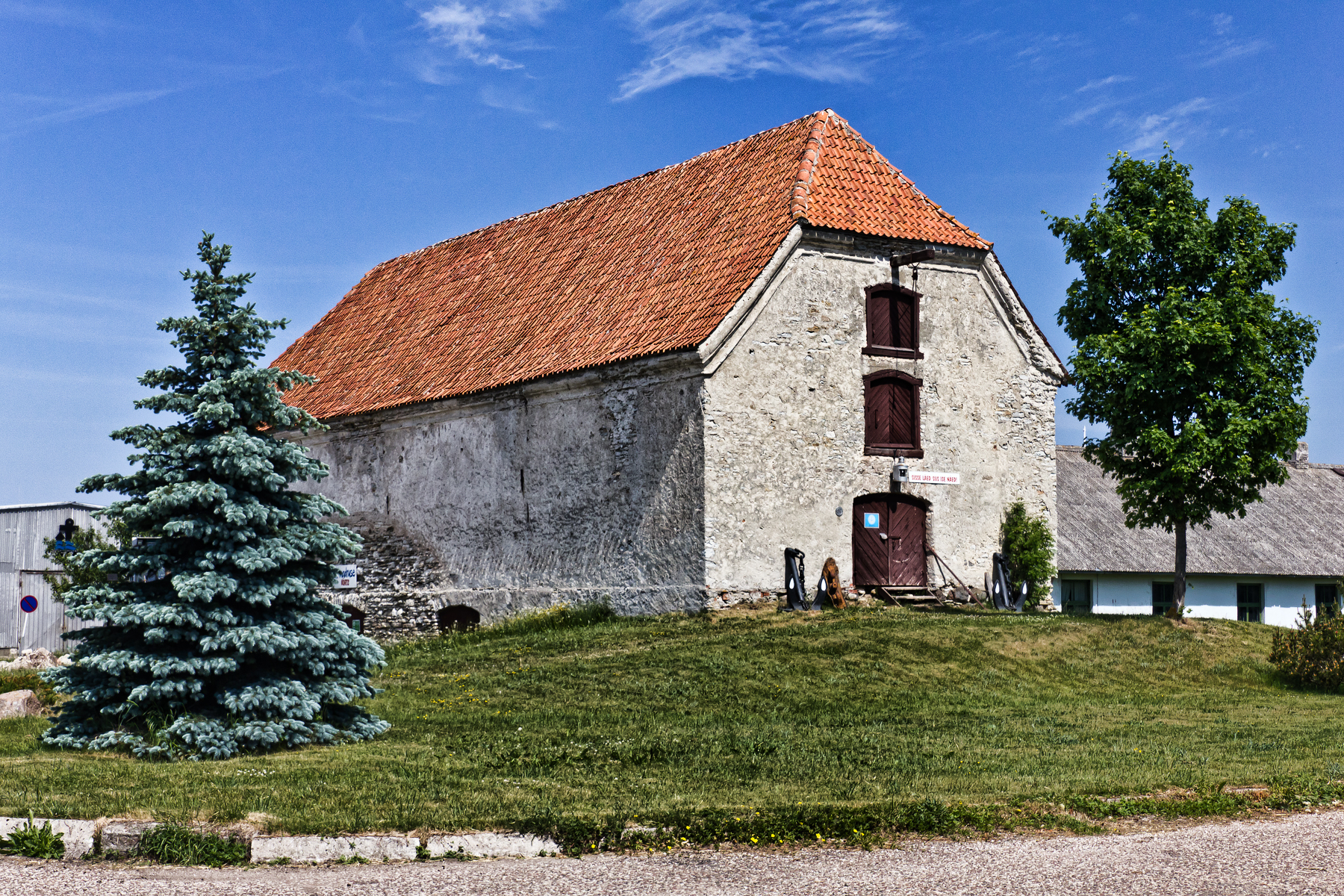 Suursadama ait Hiiumaal